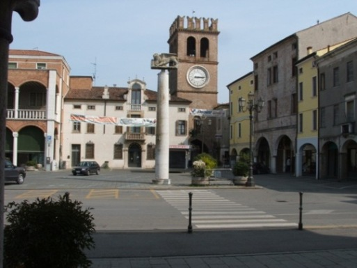 autore: groucho85 fonte:groucho85 descrizione:Piazza Risorgimento licenza d'uso: pubblico dominio note: foto fatta da me, groucho85, per wikipedia